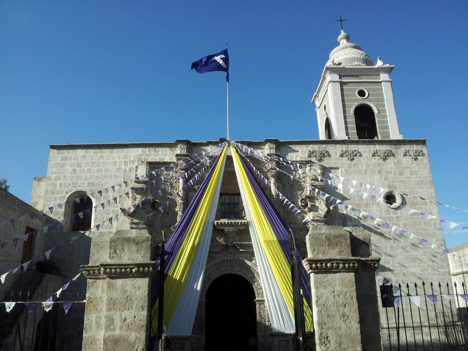 San Agustín, Arequipa, en el Mes Morado